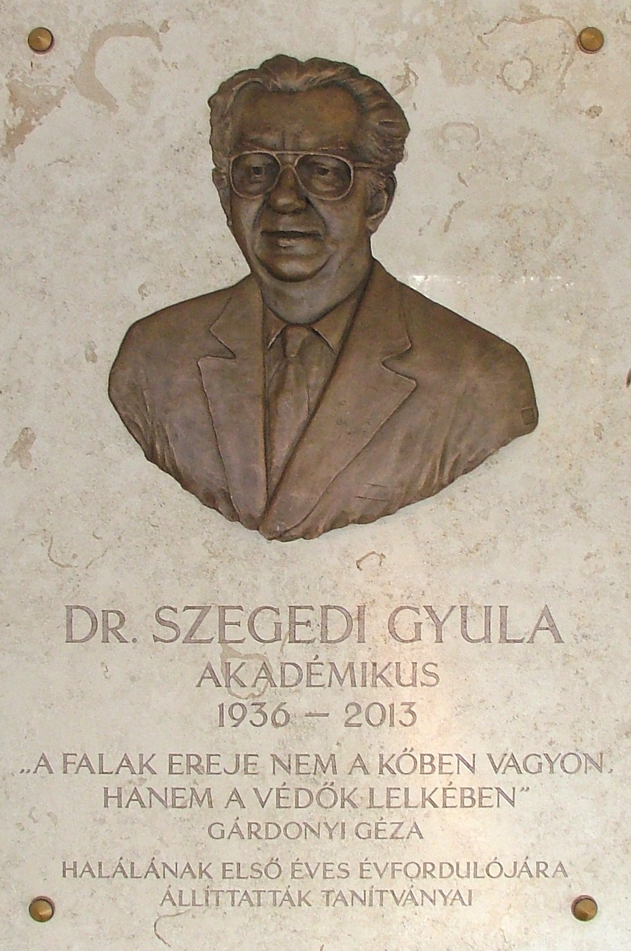 Juha Richárd: Dr. Szegedi Gyula bronz domborműve (Debrecen, Móricz Zsigmond körút 22.)